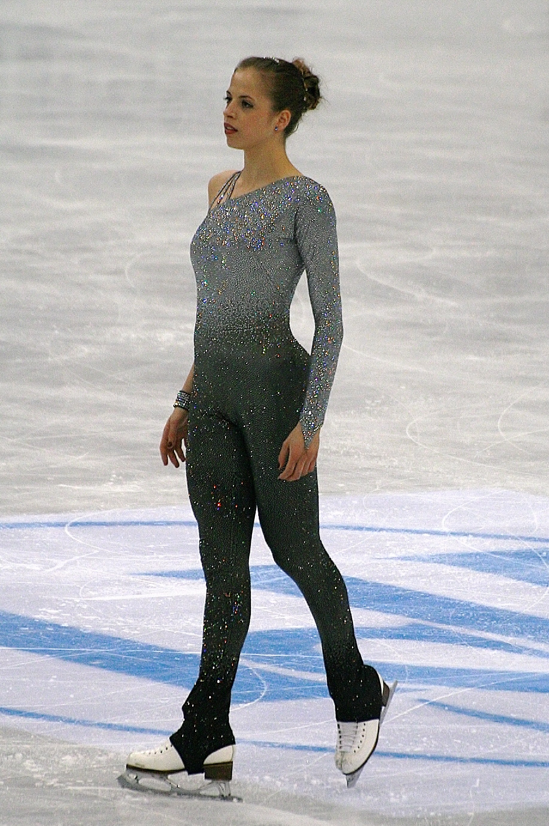 Каролина Костнер (Италия) на чемпионате мира по фигурному катанию 2012